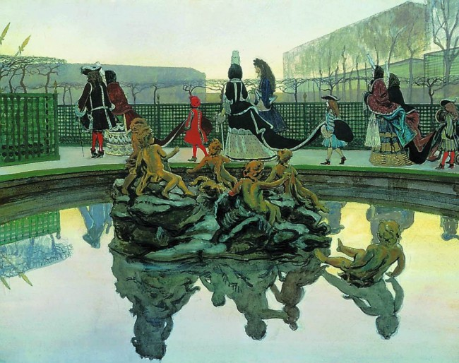 Прогулка короля - Александр Николаевич Бенуа. 1906. Бумага на холсте, акварель, гуашь, бронзовая краска, серебряная краска, графитный карандаш, перо, кисть. 48x62. ГТГ